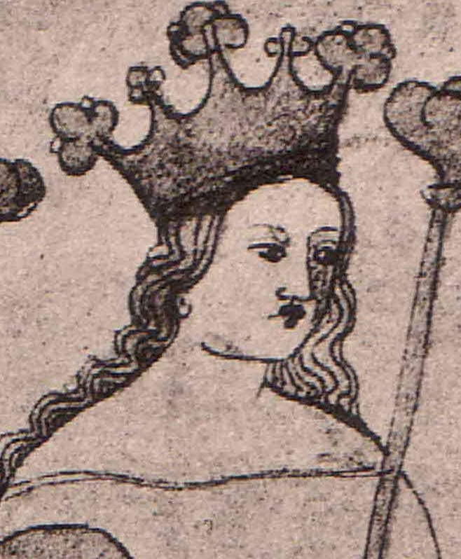 Guta Habsburská